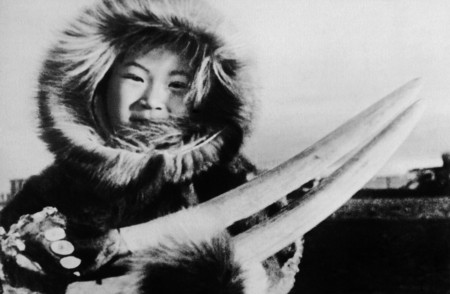 "Siberian eskimo"